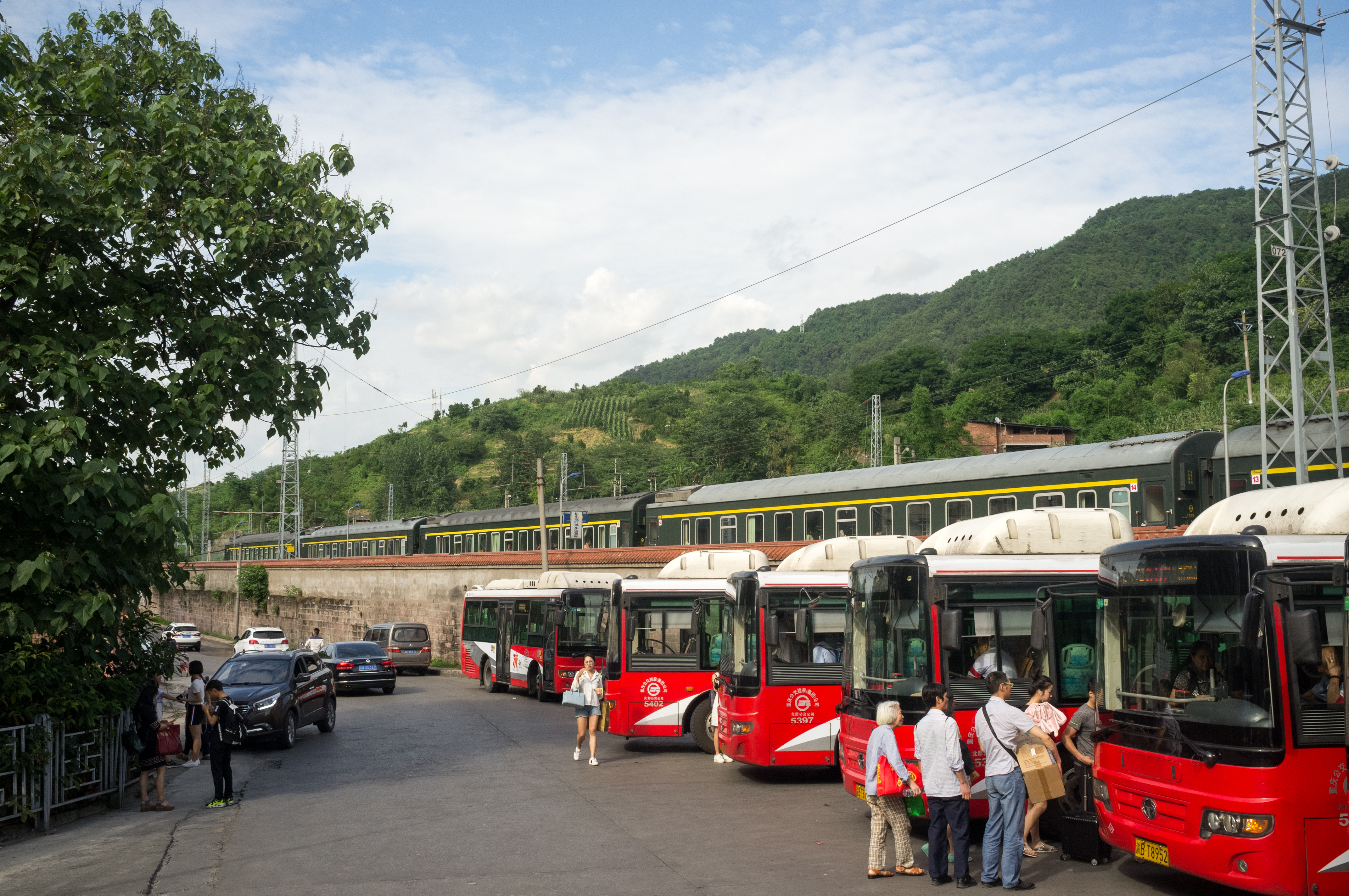 中文（中国大陆）: 国铁北碚站外的公共汽车服务